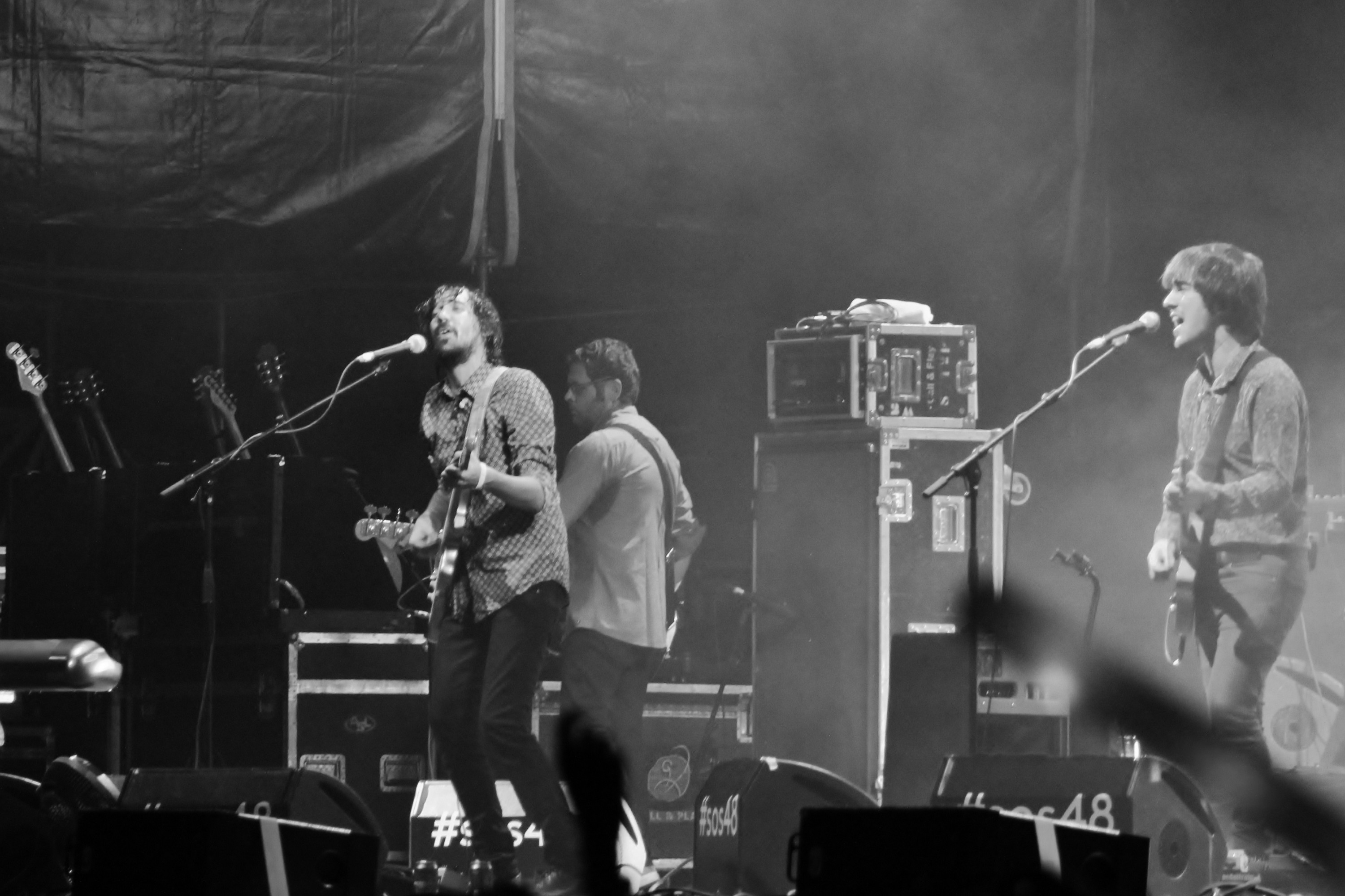 Lori Meyers es un grupo indie rock español, originario de la localidad granadina de Loja. Concierto en el Festival SOS 4.8 2015, en Murcia.